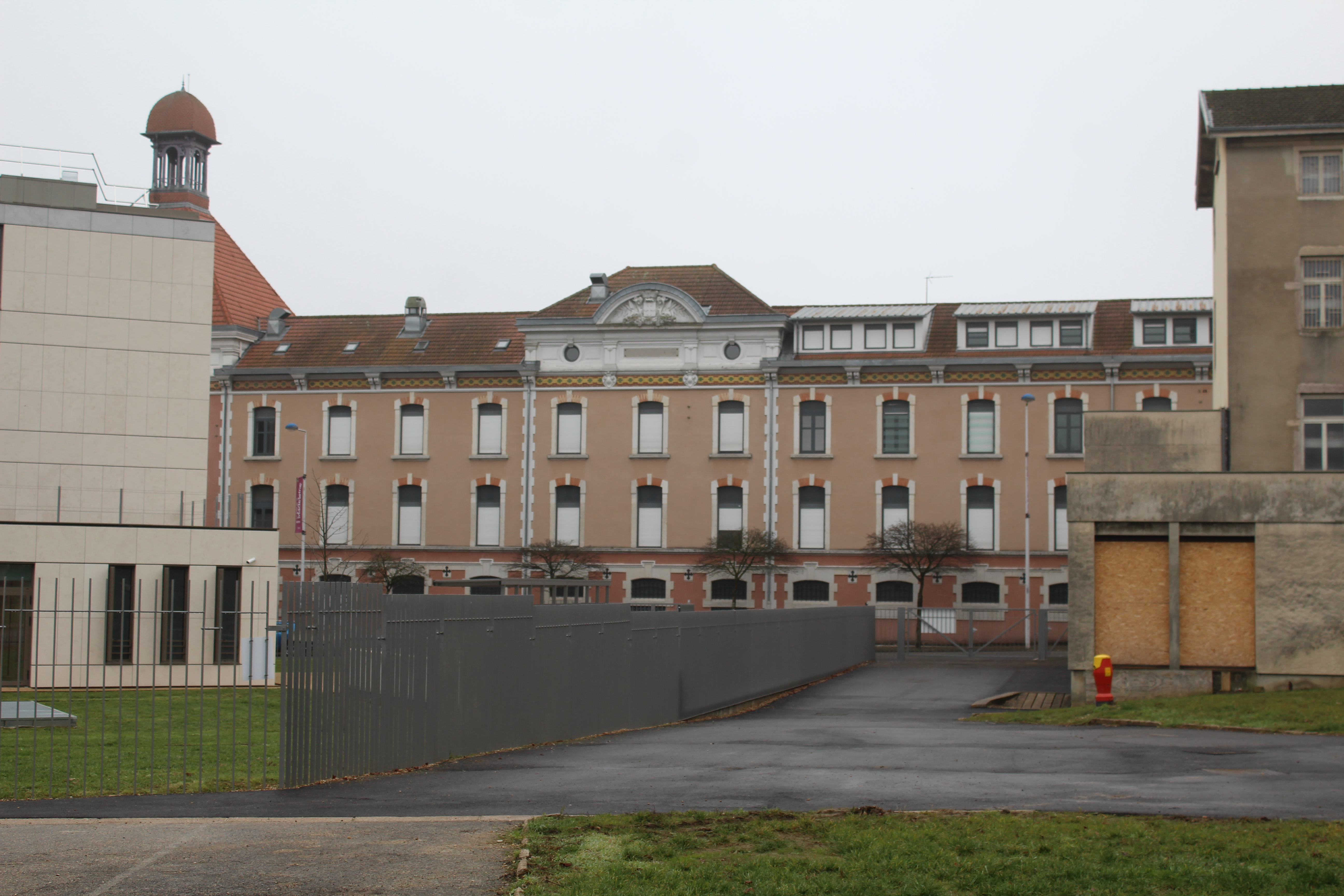 Lycée Marcelle Pardé vu depuis le parc de la Madeleine à Bourg-en-Bresse.